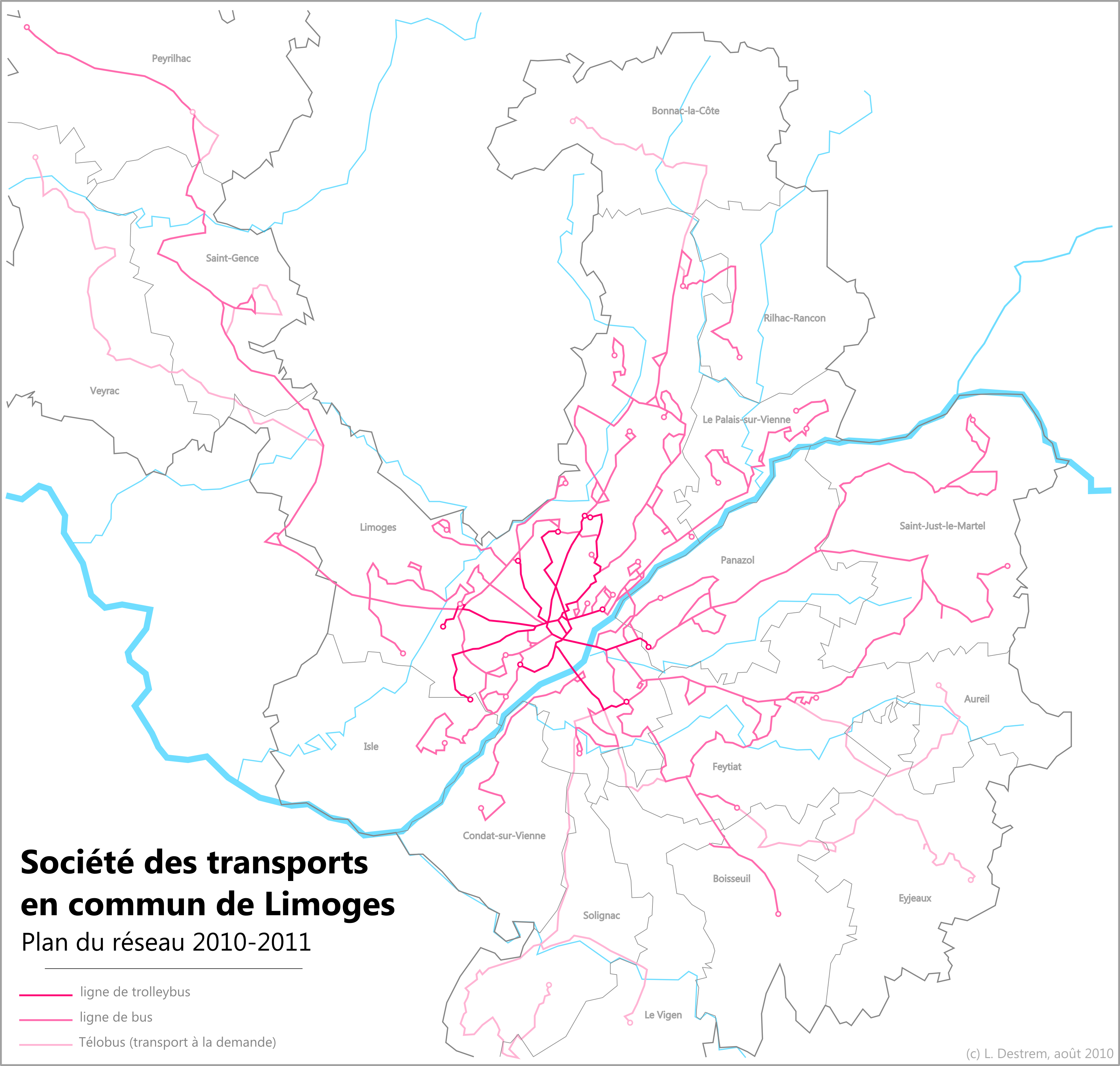 Carte des lignes du réseau de la STCL (Limoges)